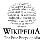 维基百科的第二个标志